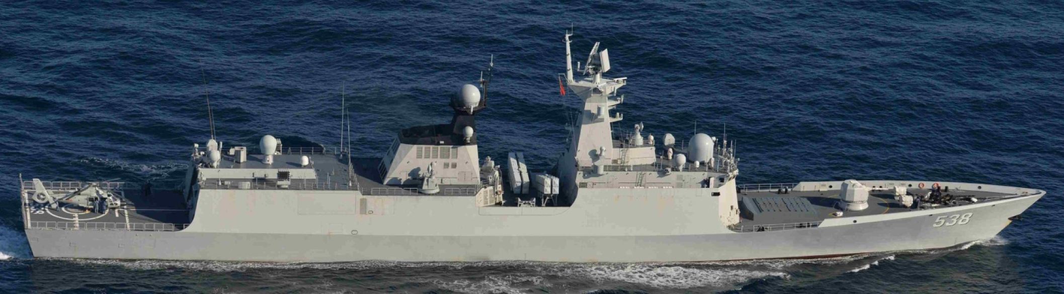 １２月２７日（土）午後２時半頃、海上自衛隊第８護衛隊「すずつき」（佐世保）及び第４航空群所属「Ｐ－３Ｃ」（厚木）が、上対馬の北東約３１０ｋｍの海域を南西進する中国海軍ルフ級駆逐艦１隻、ジャンカイⅡ級フリゲート２隻及びフチ級補給艦１隻の合計４隻を確認した。 その後、当該艦艇が対馬海峡を南下したことを確認した。 なお、これら４隻の中国艦艇は１２月４日（木）に大隅海峡を東航し、その後、西太平洋で活動、１２月２５日（木）に宗谷海峡を西航したものと同一である。